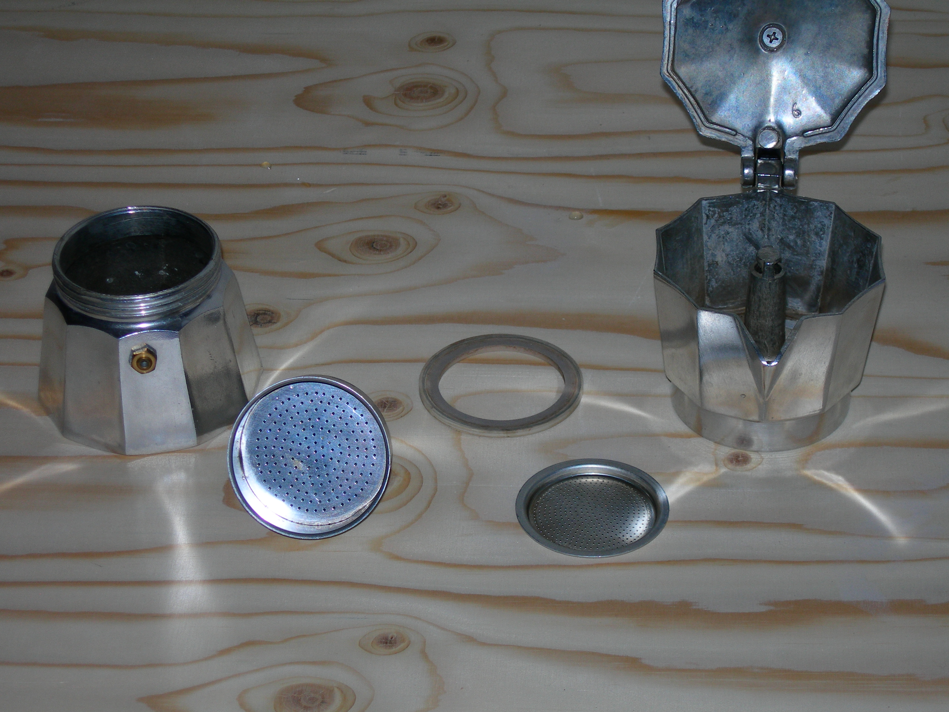 Overzicht van de onderdelen van een Moka express